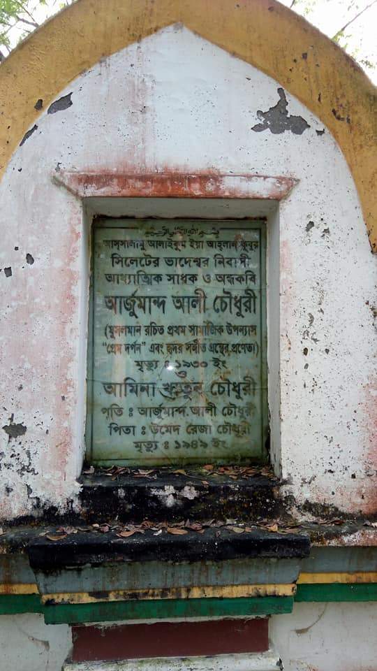 সমাধিটি চাঁদপুর জেলার ফরিদগঞ্জ থানার রূপসা গ্রামে অবস্থিত।